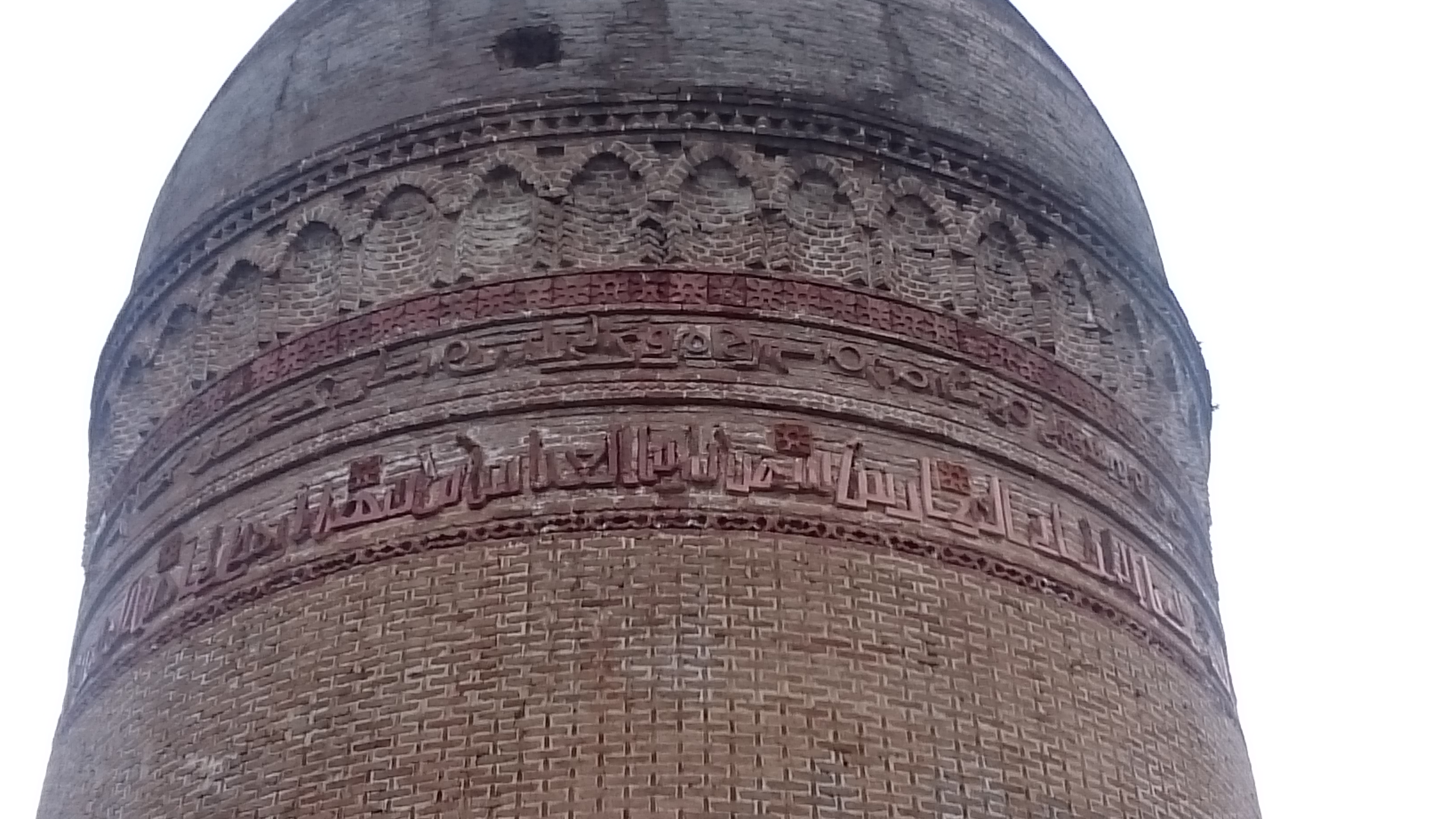 نوشتا روی برج